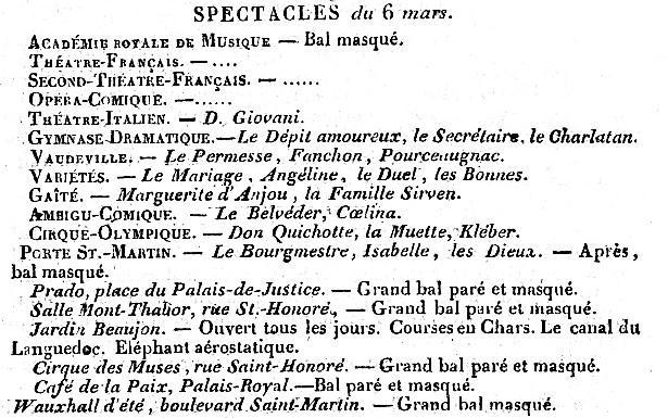 Programme des bals du Mardi Gras 6 mars 1821.